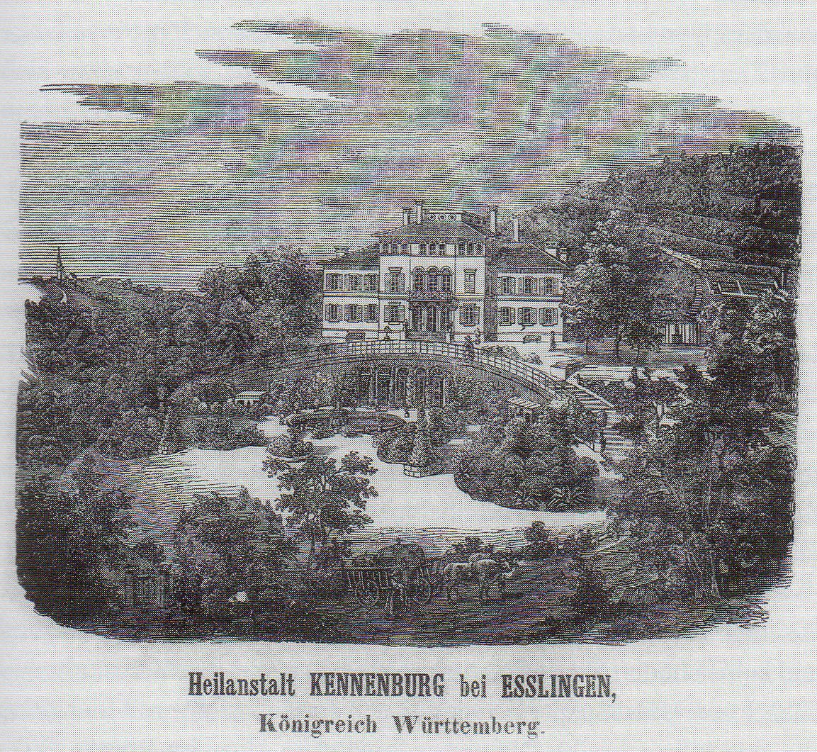 Heilanstalt Kennenburg, Prospektbild